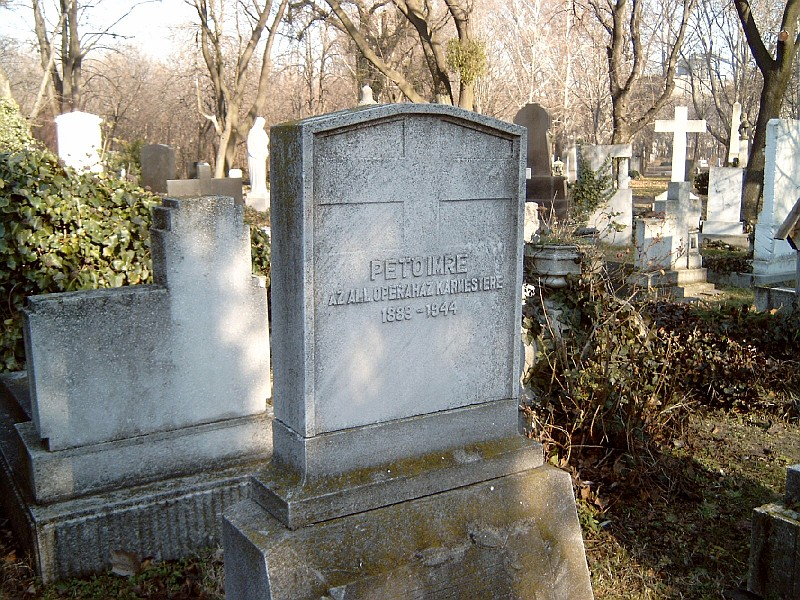 Pető Imre (Keszthely, 1882 – Budapest, 1944) karmester, zenepedagógus sírja Budapesten. Kerepesi temető: 34-5-36